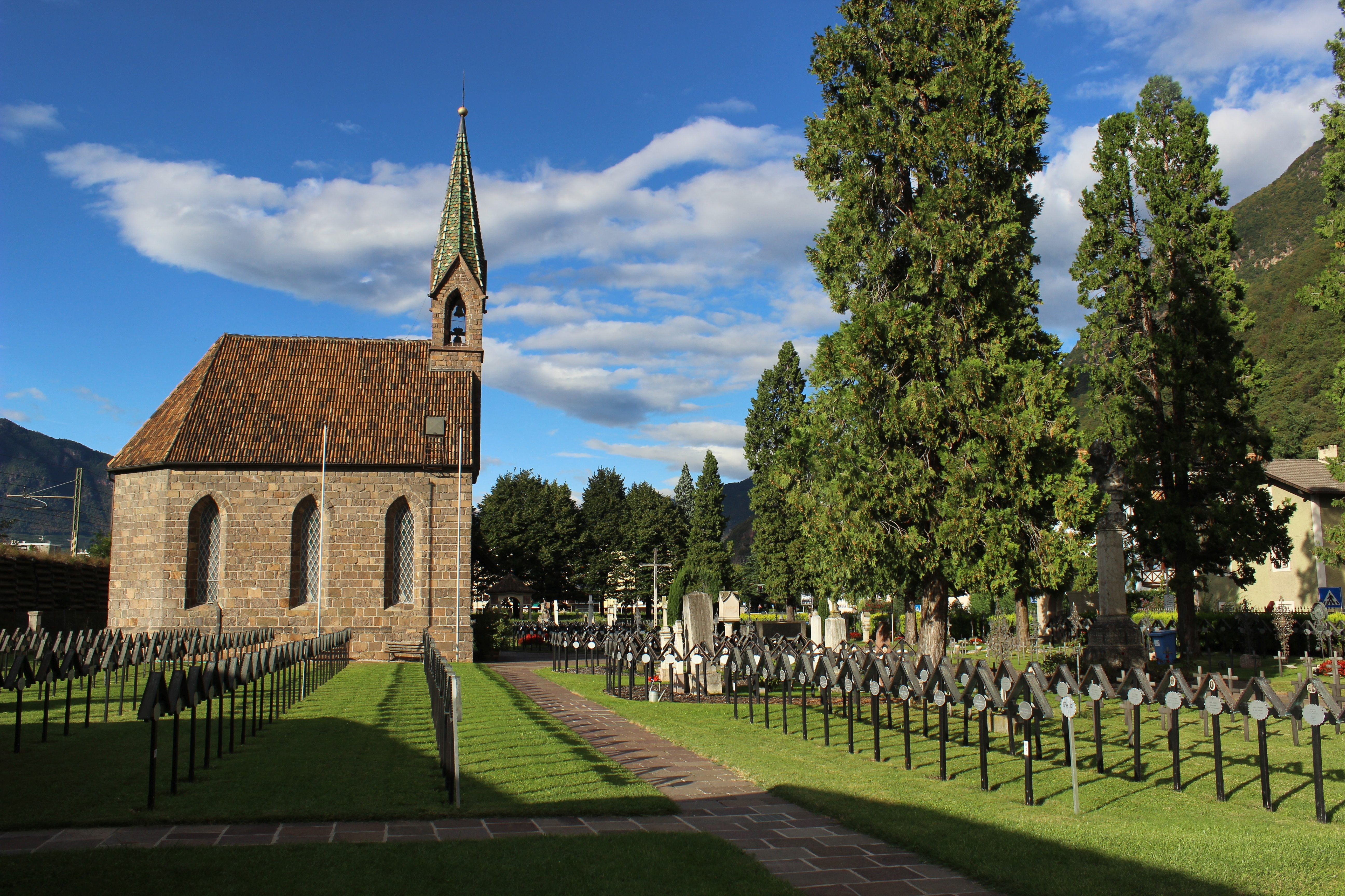 Soldatenfriedhof mit Mariahilfkapelle in St. Jakob bei Bozen